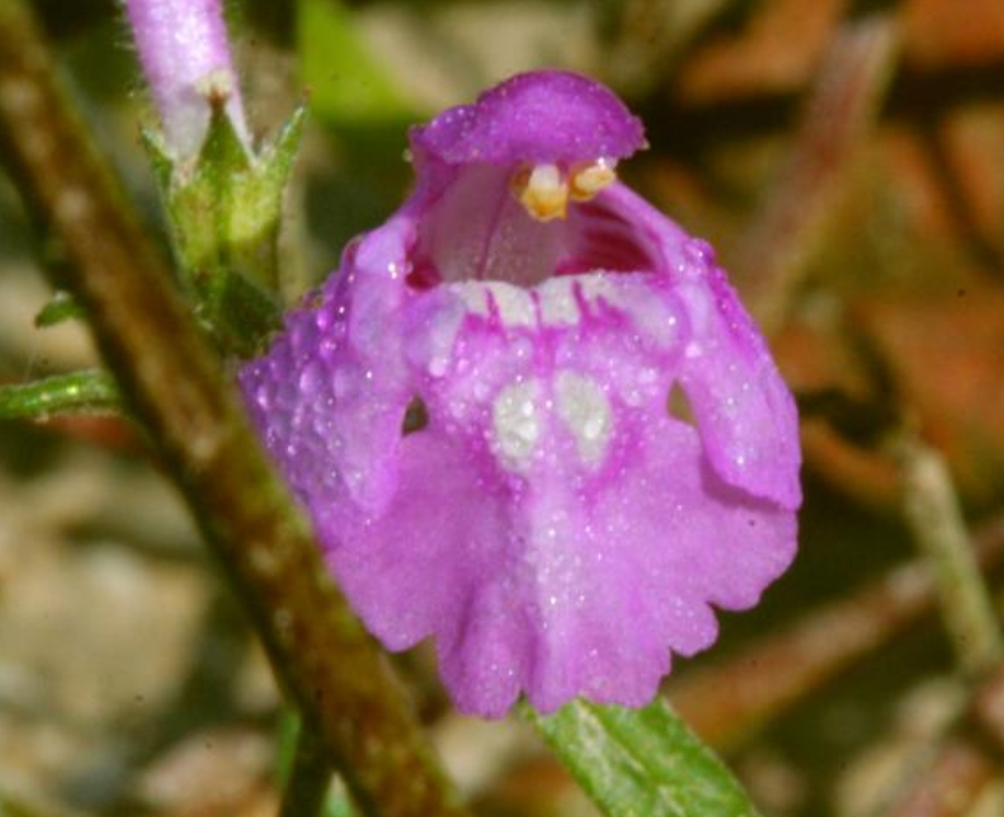 Galeopsis angustifolia